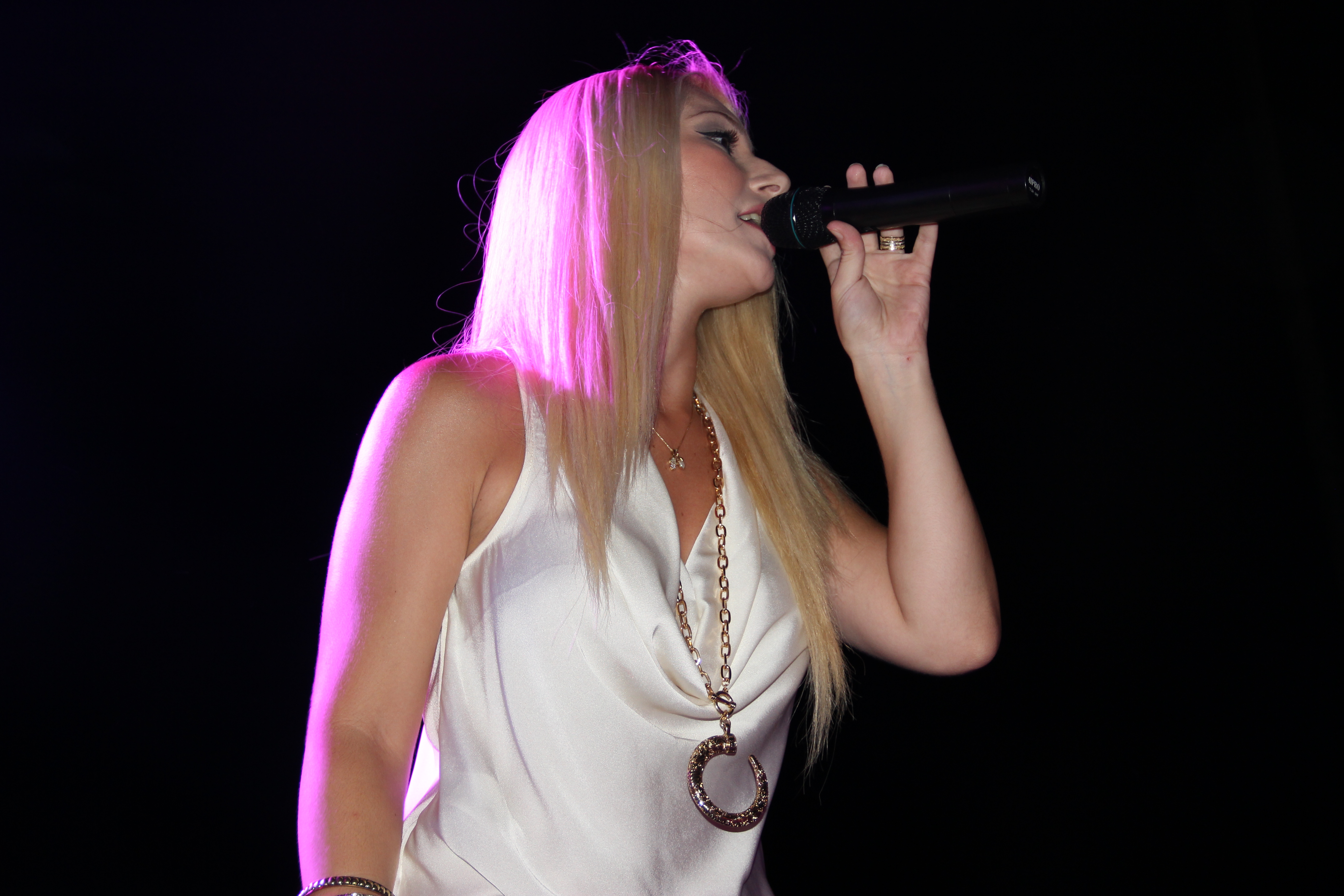 Rinat bar